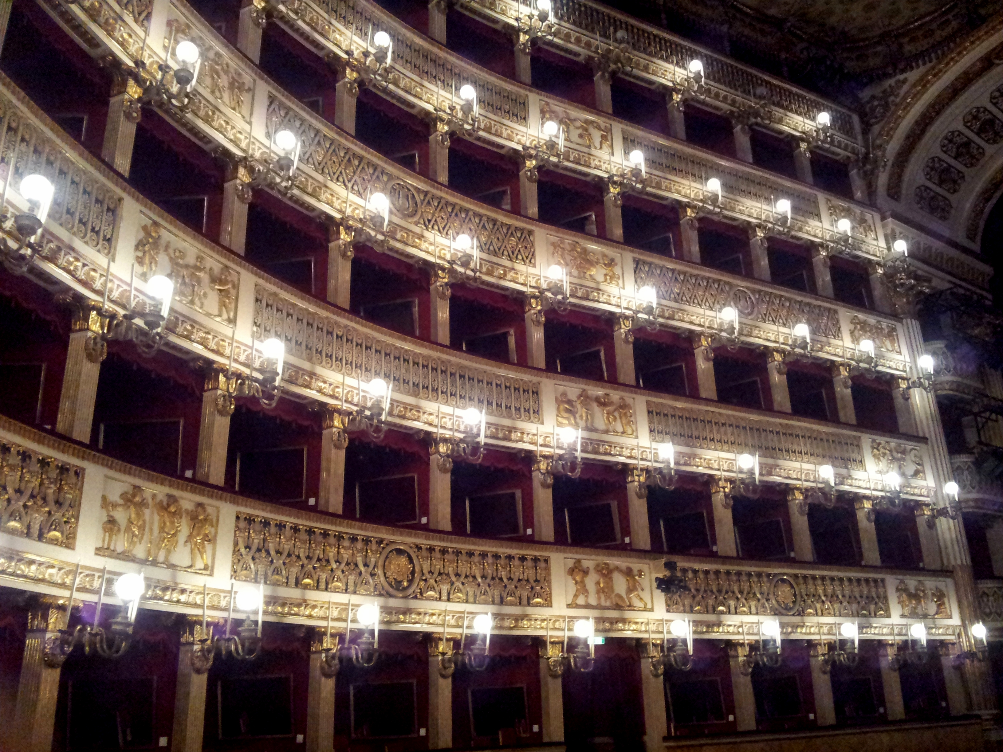 Lato destro del Real Teatro di San Carlo (Napoli). Si vedono i cinque palchi più il loggione